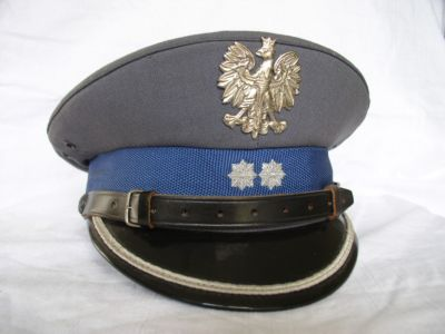 czapka podkomisarza Policji (stary wzór)